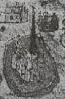 Baasrode in 1571. Uit het landboek van Moerzeke.